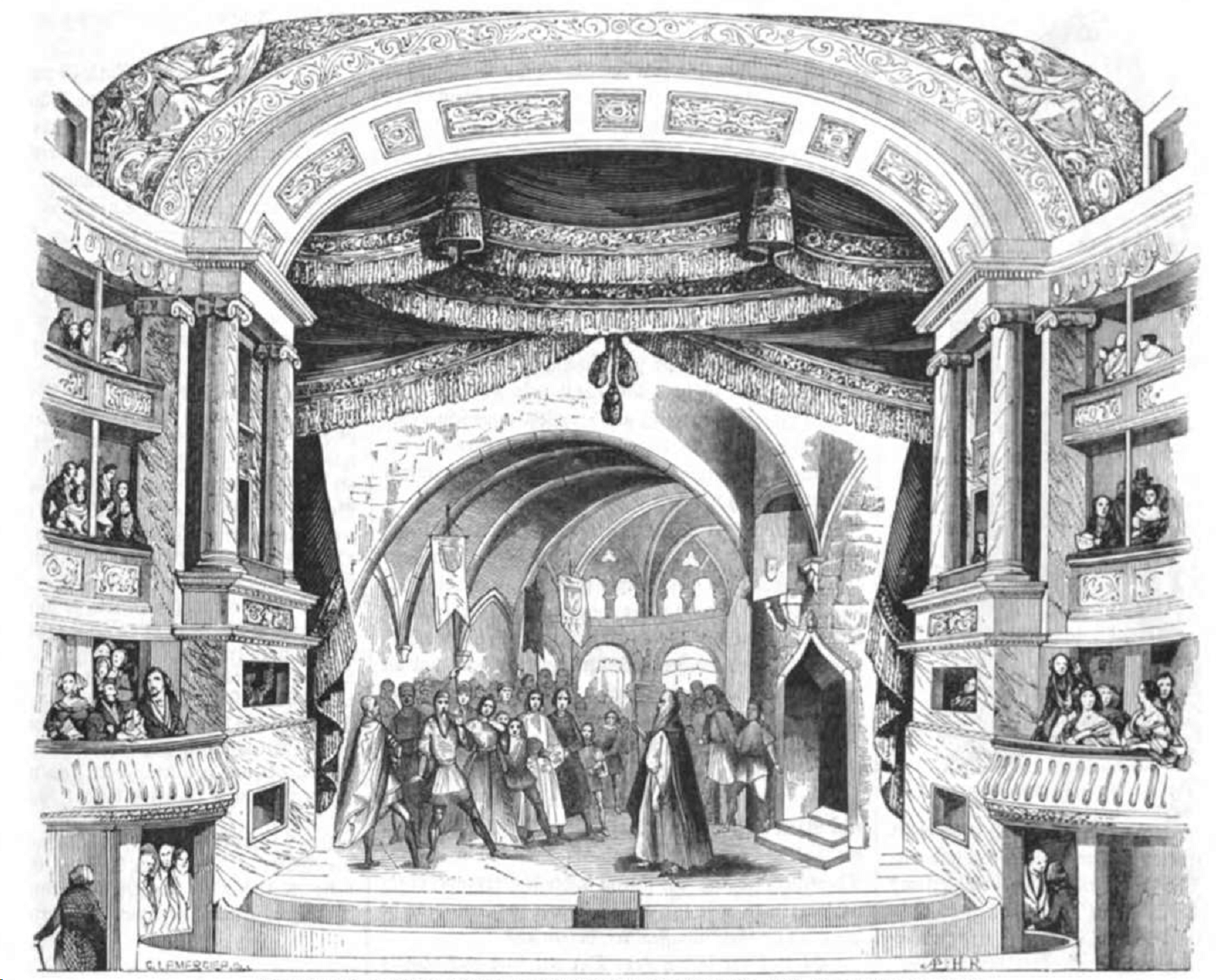 Scene des zweiten Actes, wo Friedrich Barbarossa sich zu erkennen giebt